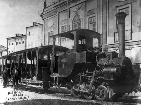 Composição do comboio a vapor urbano de Braga, Portugal, 1886-1905.